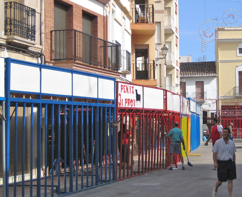 Imatge dels escarafalls al carrer previ a un dia de Bous al carrer a El Verger, 2007 a la Marina Alta, País Valencià.